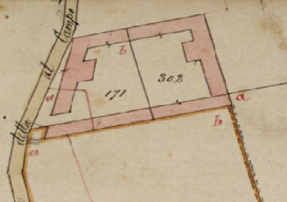 Mappa catastale